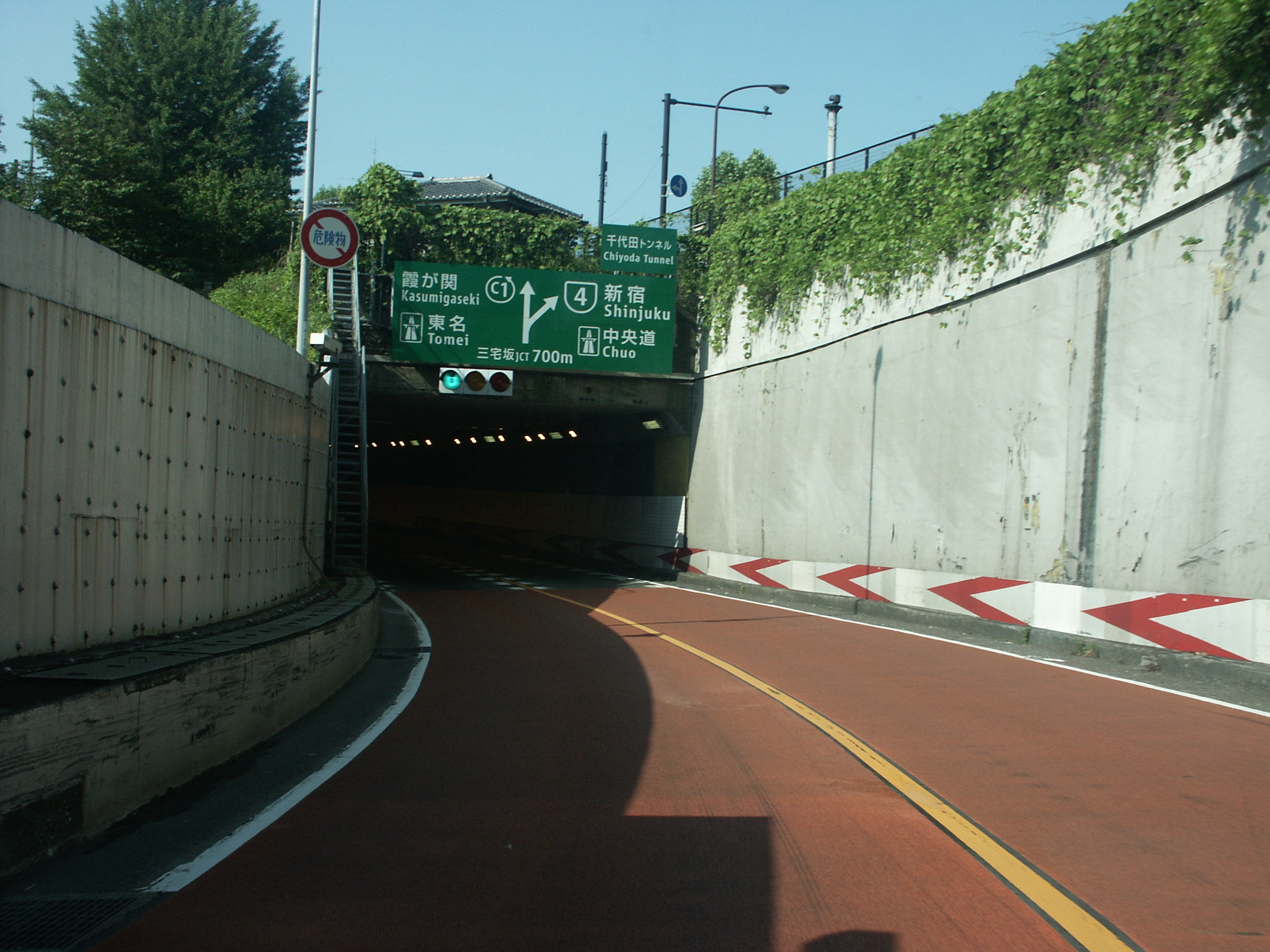 首都高速都心環状線千代田トンネル内回り側坑口